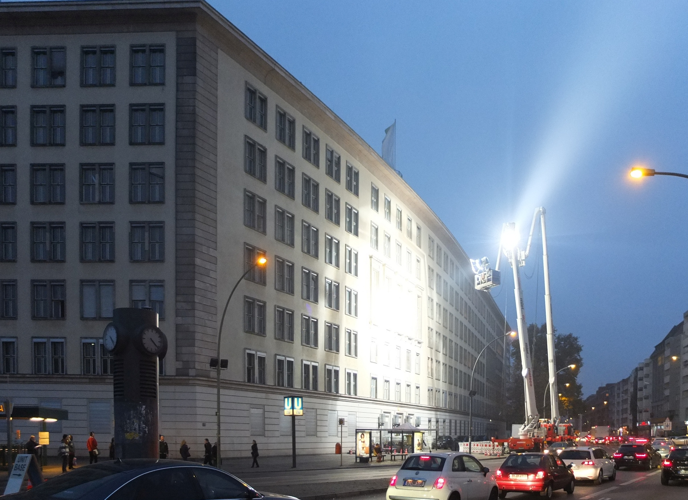 Verwaltungsgebäude Potsdamer Straße 192 in Berlin-Schöneberg bei Dreharbeiten für den Film "Bridge of Spies"